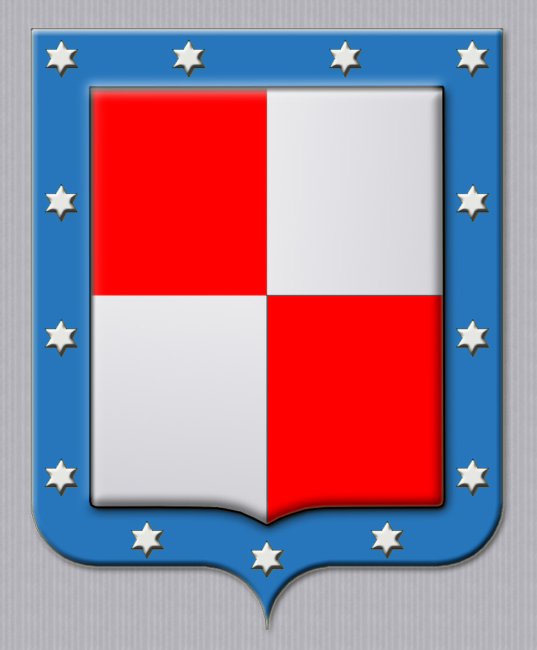 L'immagine rappresenta lo Stemma nobiliare della Famiglia Padovana Dotti de' Dauli